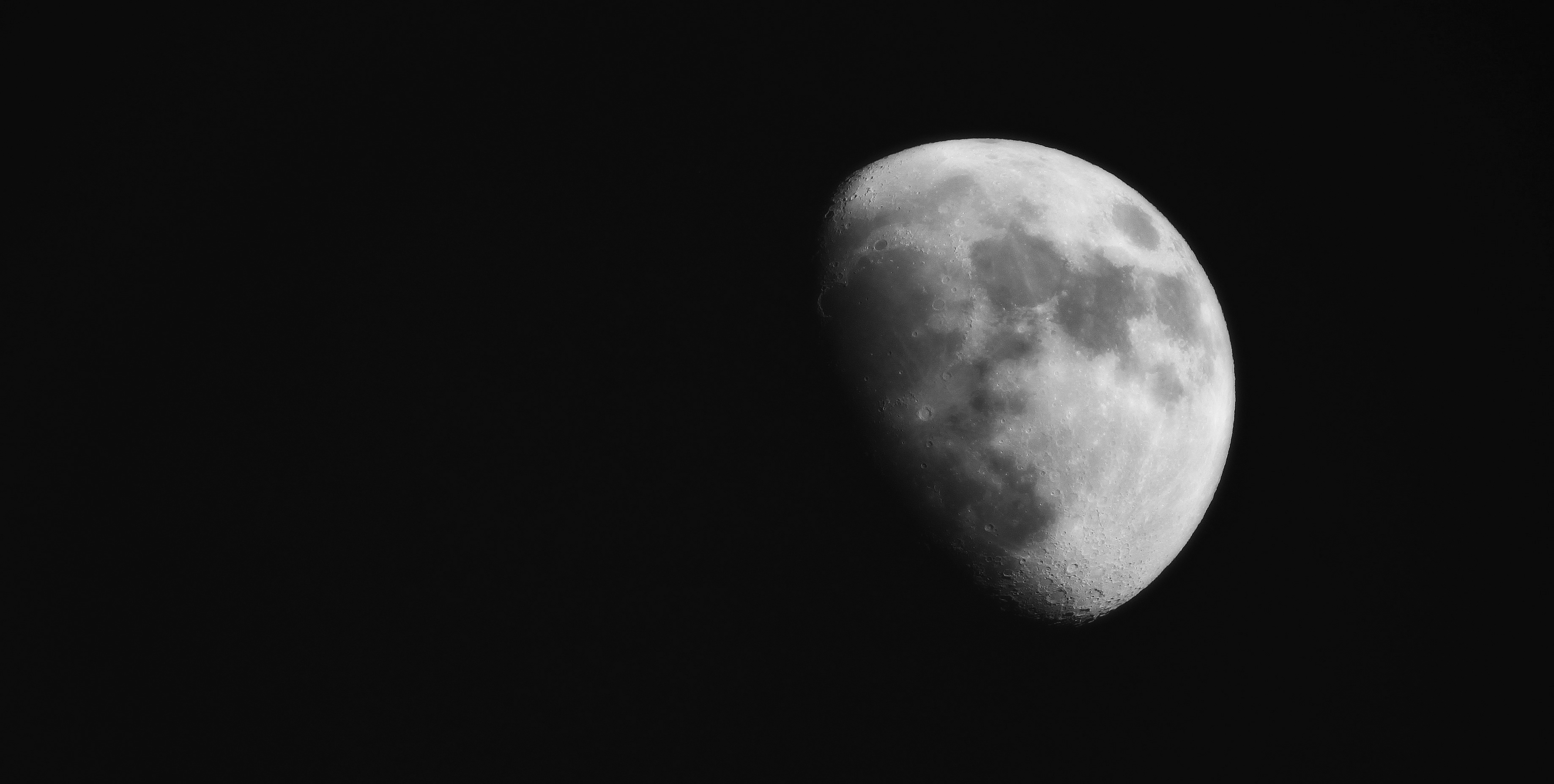 Gibbeuse croissante, photo prise à Iwuy, Nord-Pas-de-Calais, France